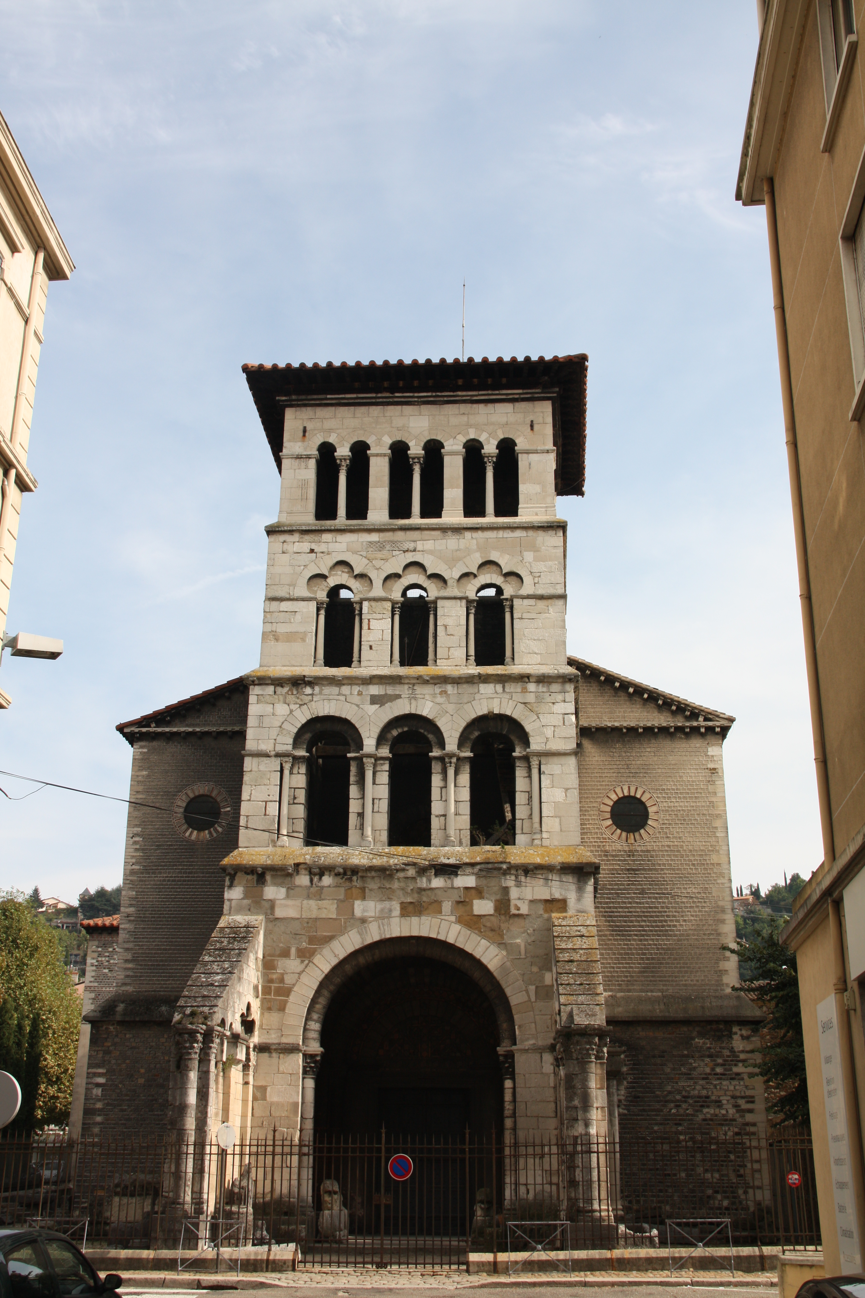 Ancienne église Saint-Pierre à Vienne, Isère, France .